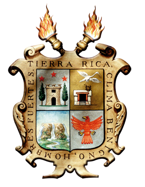 El blasón representa en sus cuatro cantones una semblanza de la ciudad. II. Superior izquierdo: muestra una torre, símbolo de Oyarzún, población vascongada. III. Superior derecho: está ilustrado con una garza blanca emprendiendo el vuelo sobre una vivienda hispánica. IV. Inferior izquierdo: expresa el significado etimológico de Saltillo en lengua náhuatl, ‘tierra alta de muchas aguas’, y, V. Inferior derecho: muestra un águila roja, representación de los huachichiles, tribu de chichimecas que poblaban Saltillo en tiempos de la conquista. El escudo está orlado con una leyenda que dice: Tierra rica, clima benigno, hombres fuertes, y dos antorchas, la del Ateneo Fuente a la derecha y a la izquierda, la de la Revolución Mexicana”.